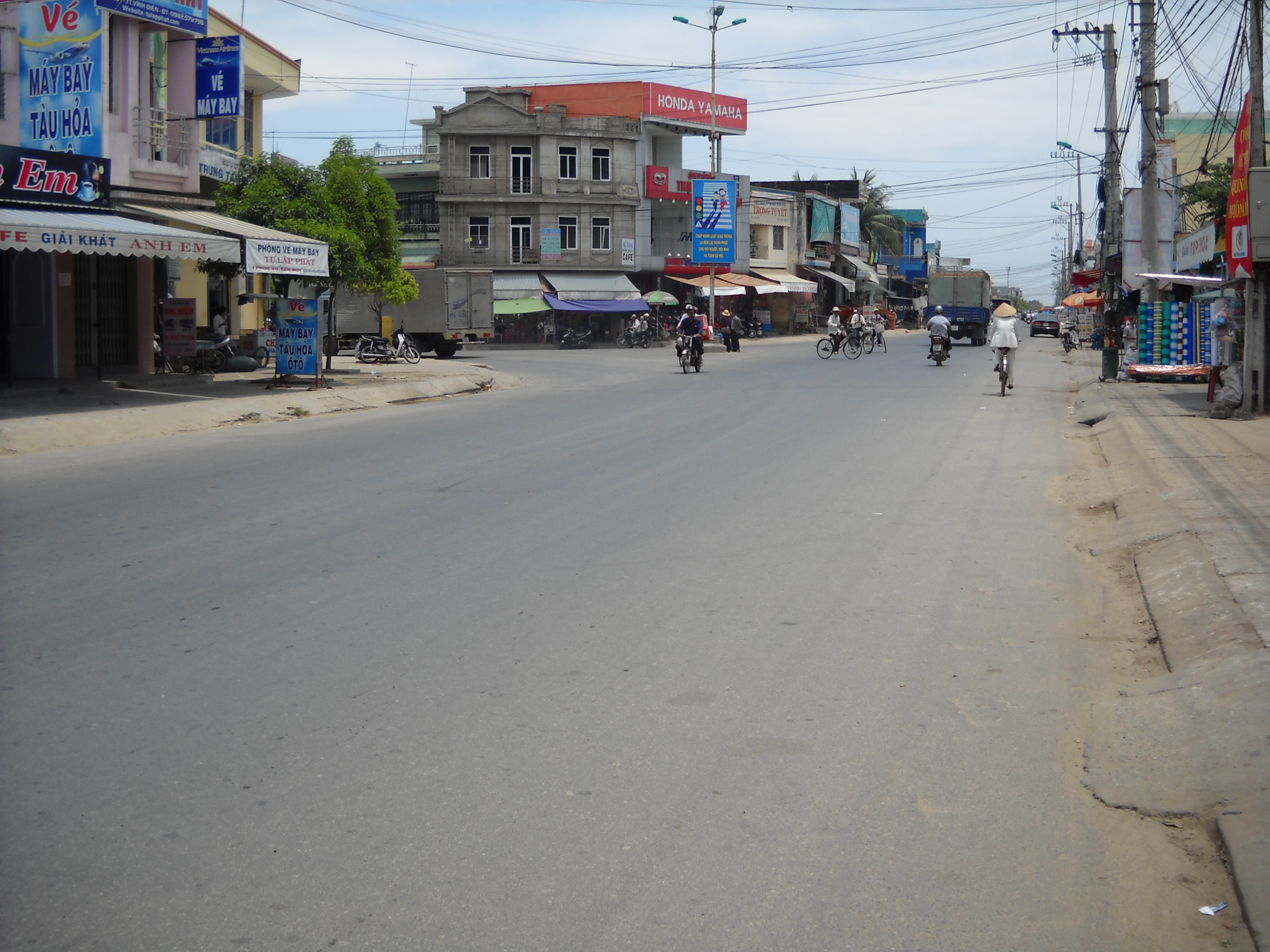 Thị trấn Vĩnh Điện, Điện Bàn, Quảng Nam